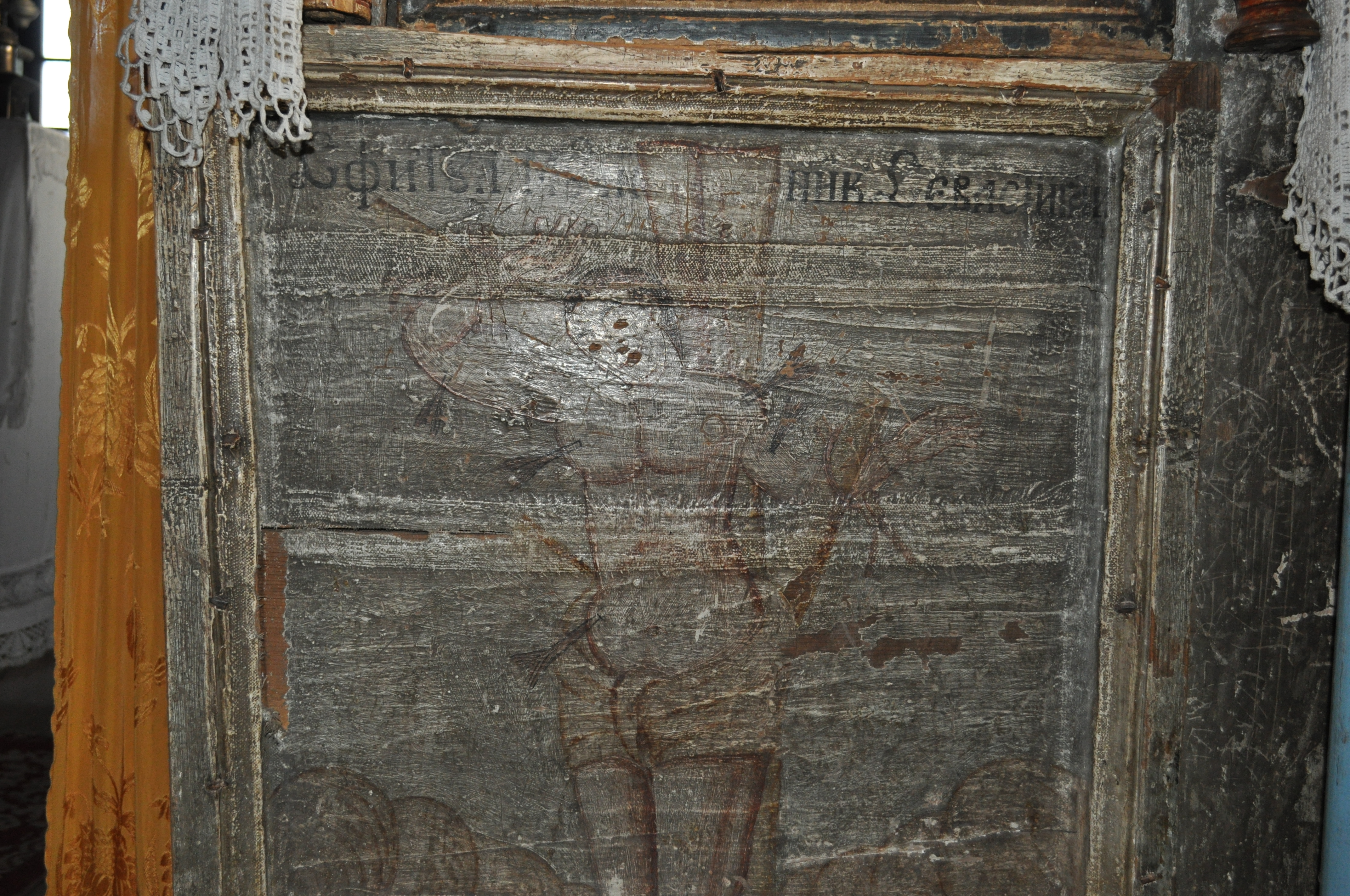 Biserica de lemn "Sfinții Arhangheli Mihail şi Gavriil" din Chieșd, județul Sălaj